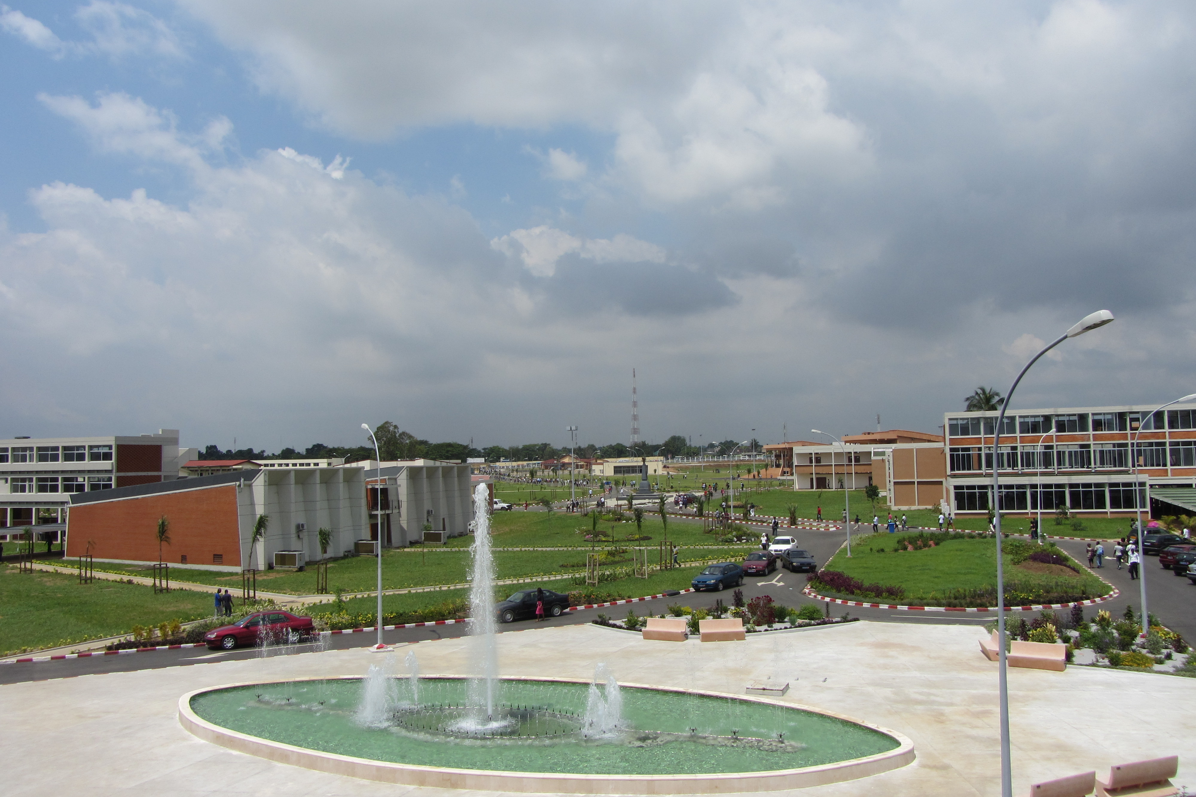 Fontaine devant la présidence de l'université Félix Houphouët-Boigny à Abidjan (Côte d'Ivoire)